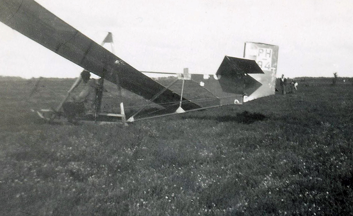 PH-94 Grunau 9, ESG photo wasblik 1946